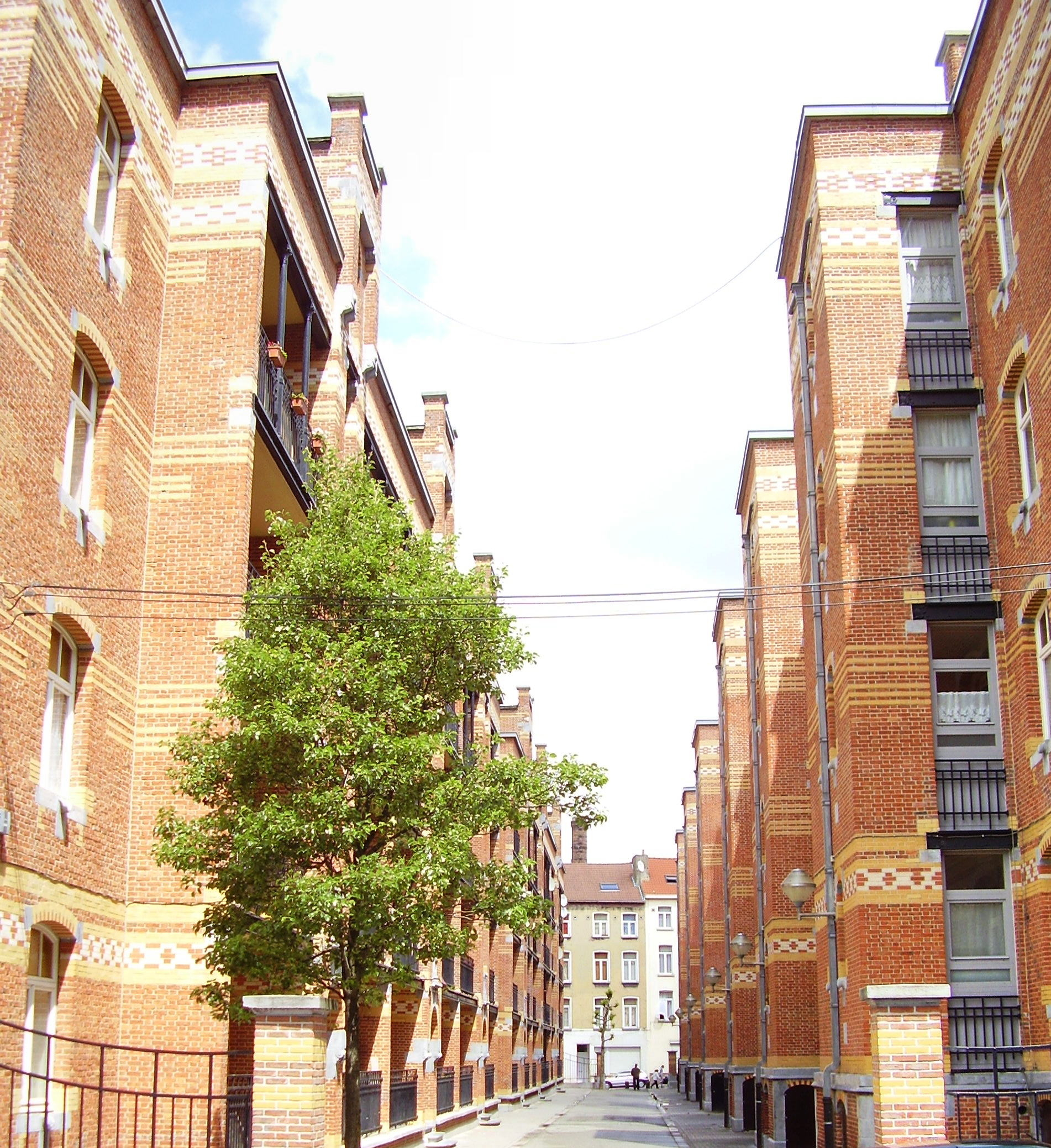 Description: Cité Hellemans (1915), quartier des Marolles (Bruxelles) Author: User:Ben2 Date of creation: 05 juillet 2006 Source: Photo personnelle